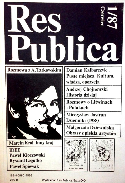 Res Publica – polskie pismo kulturalno-polityczne, czerwiec 1/1987